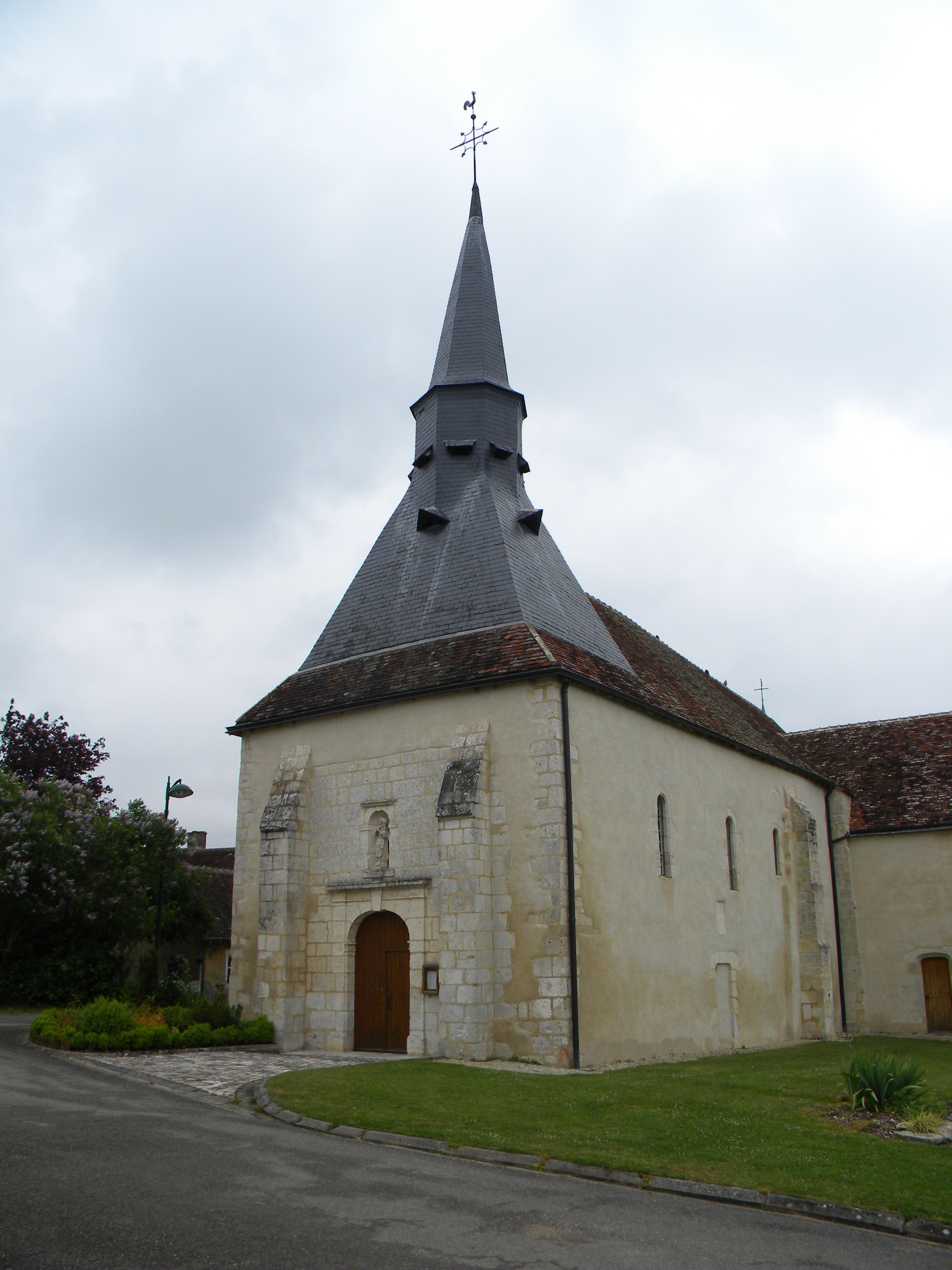 Preĝejo de Savigny-en-Septaine